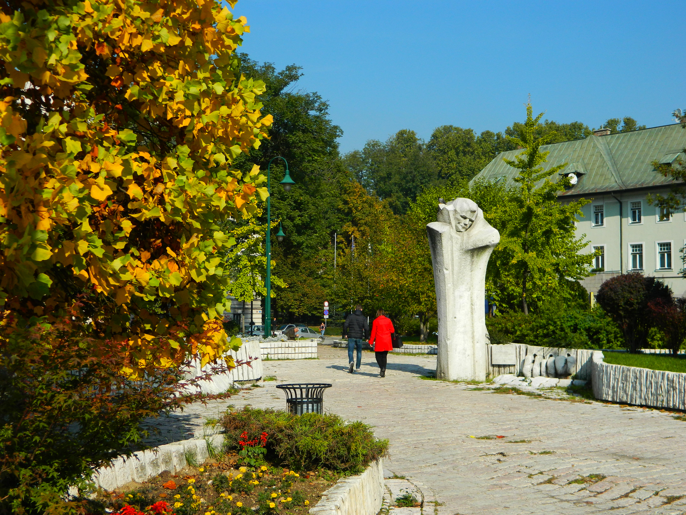 Duro Dakovic 01